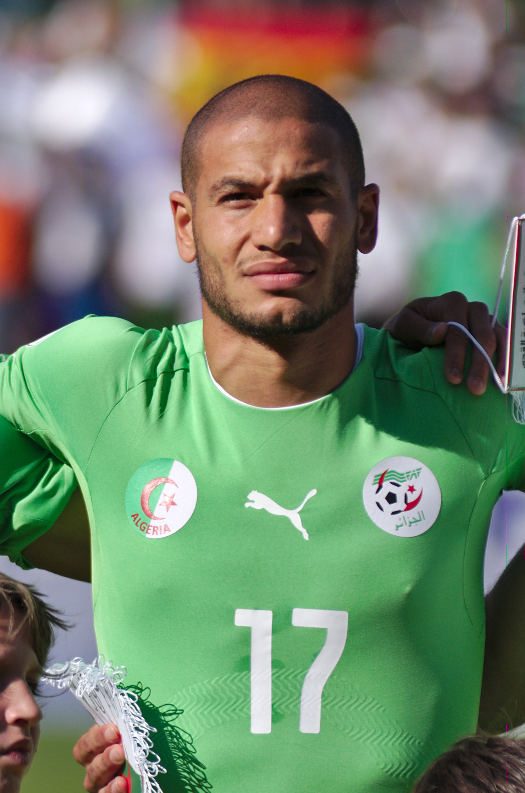 Algérie - Arménie - 20140531 - Adlan Guedioura